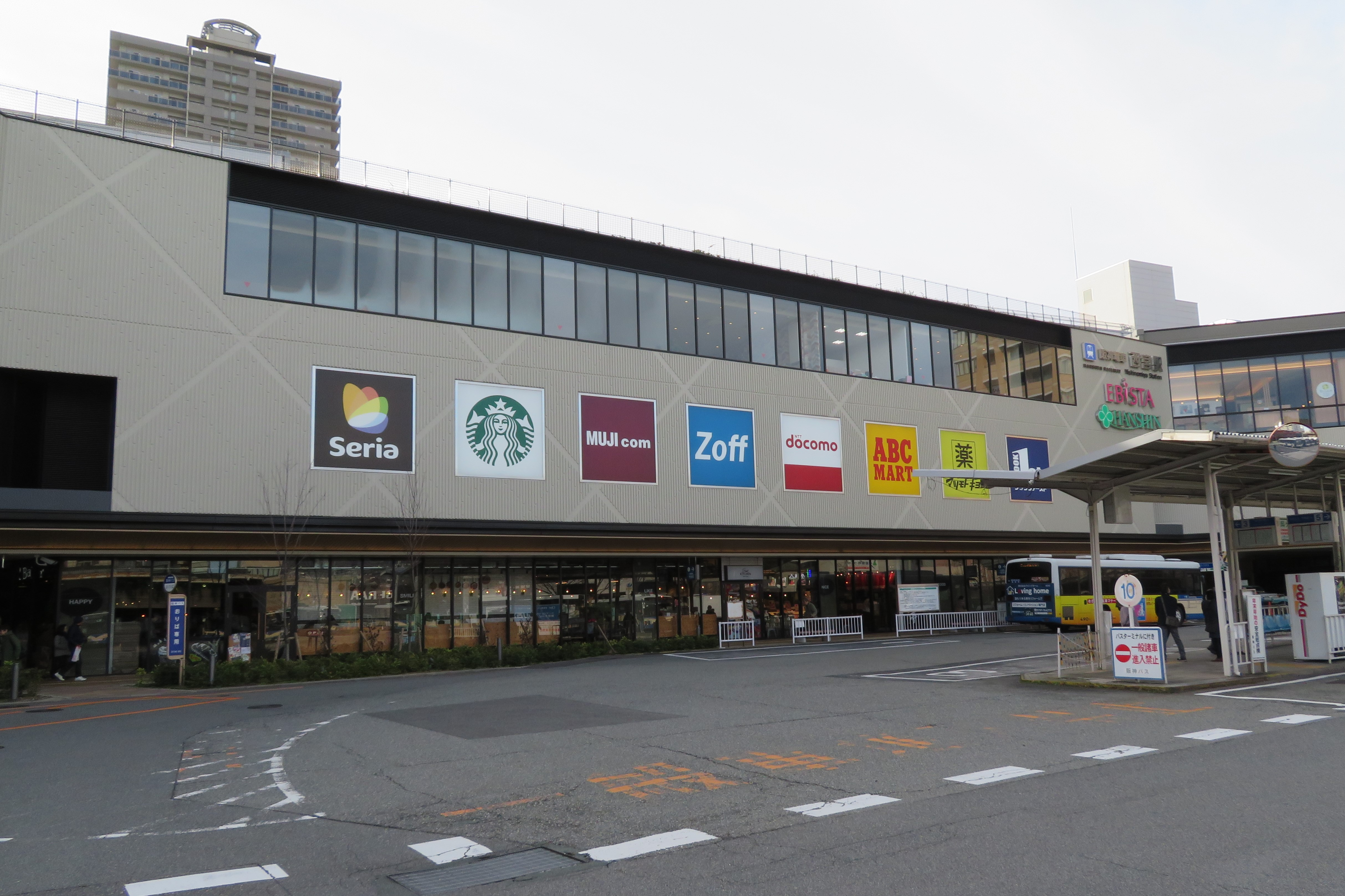 阪神西宮駅（エビスタ西宮）